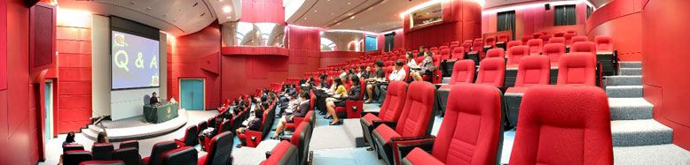 Auditorium B